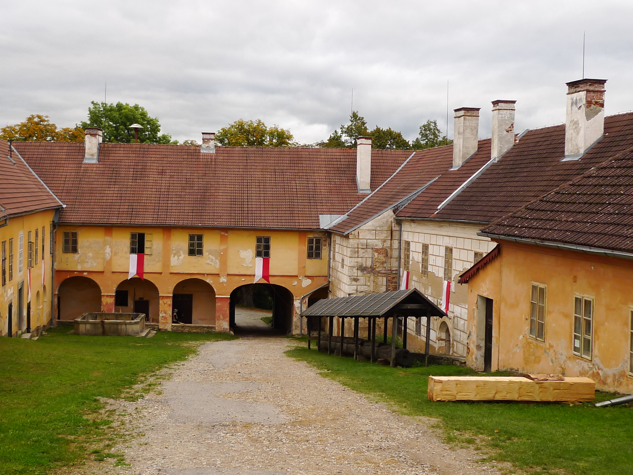 Zámek Vimperk, Vimperk 20, Vimperk.